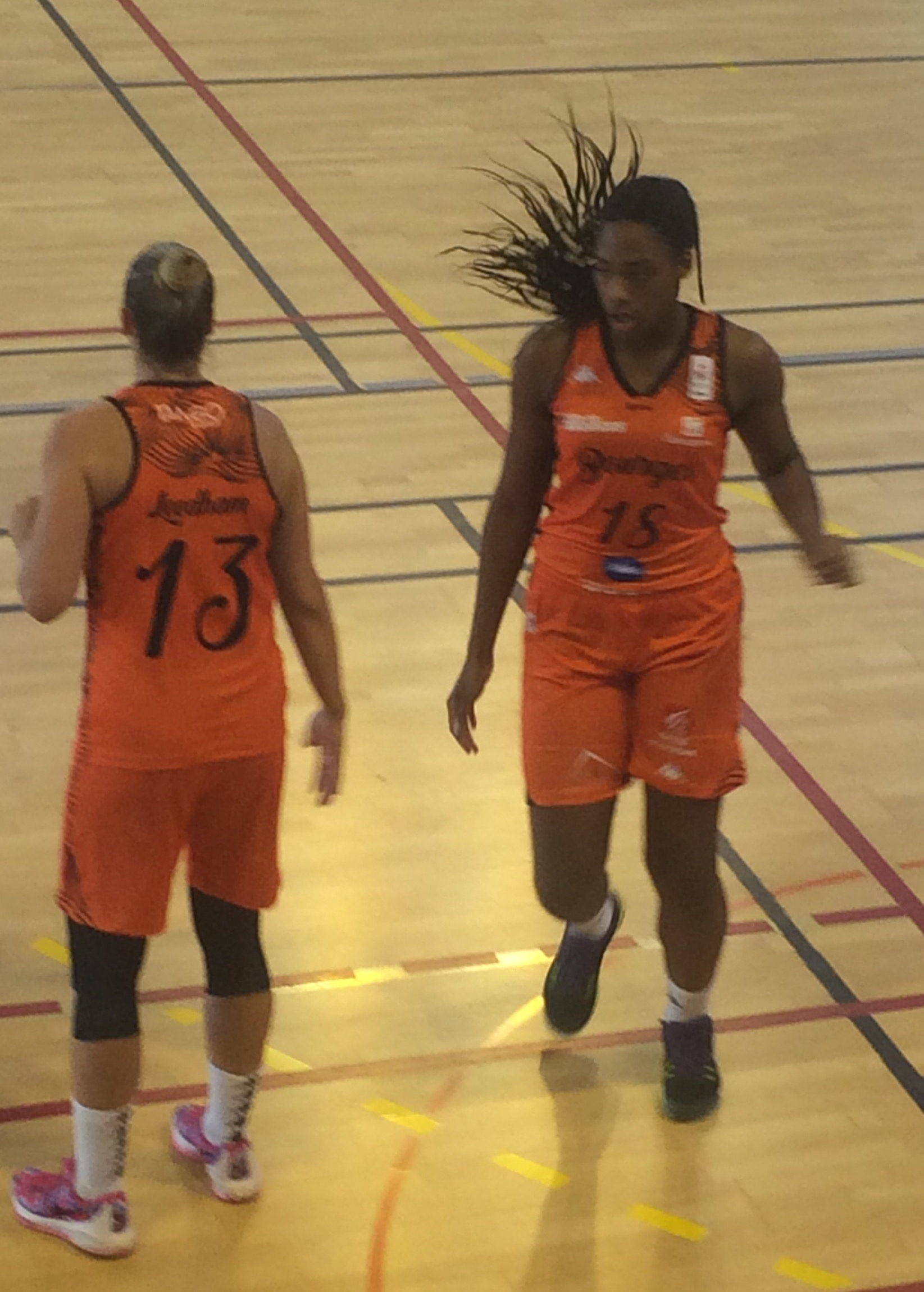 La joueuse de basket-ball Sarah Saint-Martin sous le maillot de Bourges le 3 septembre 2016 aux Pavillons-sous-Bois face à Angers